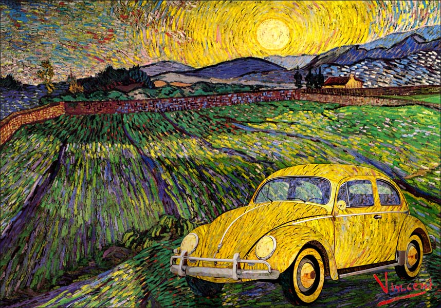 VW-Vincent (Volkswagen)